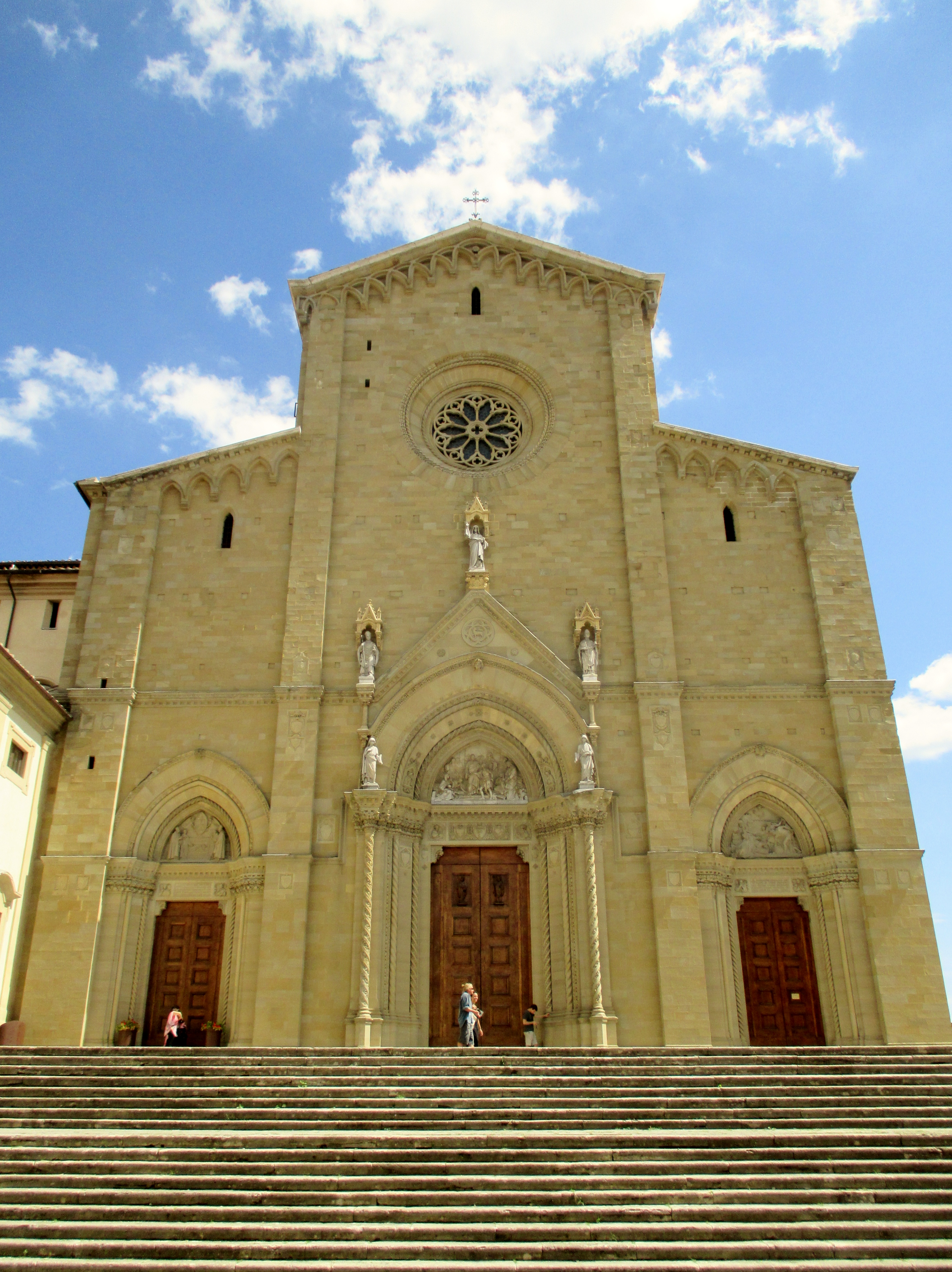 Arezzo, veduta della facciata neogotica del Duomo.